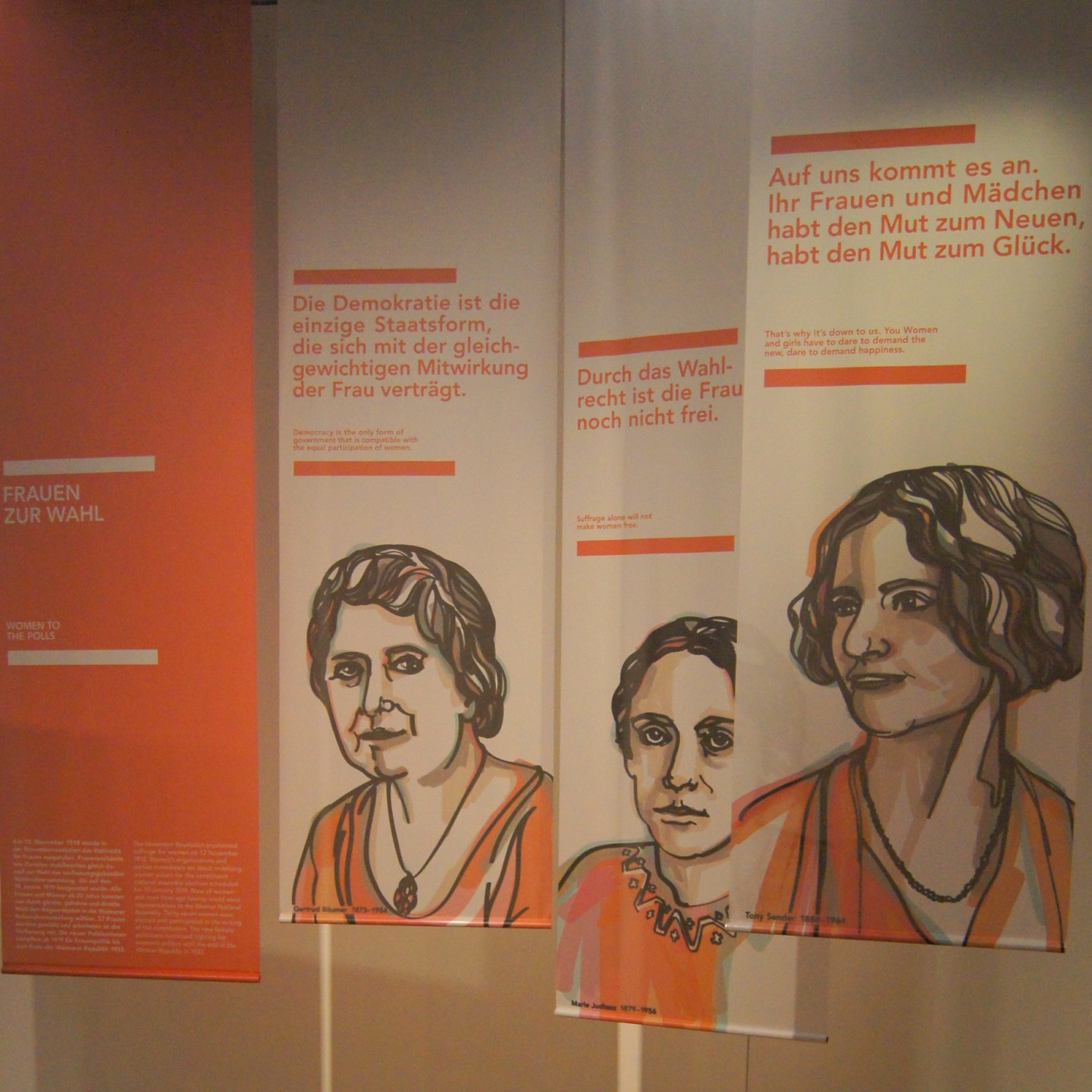 Ausstellung: Damenwahl - Banner der 3. Abteilung: Frauen zur Wahl